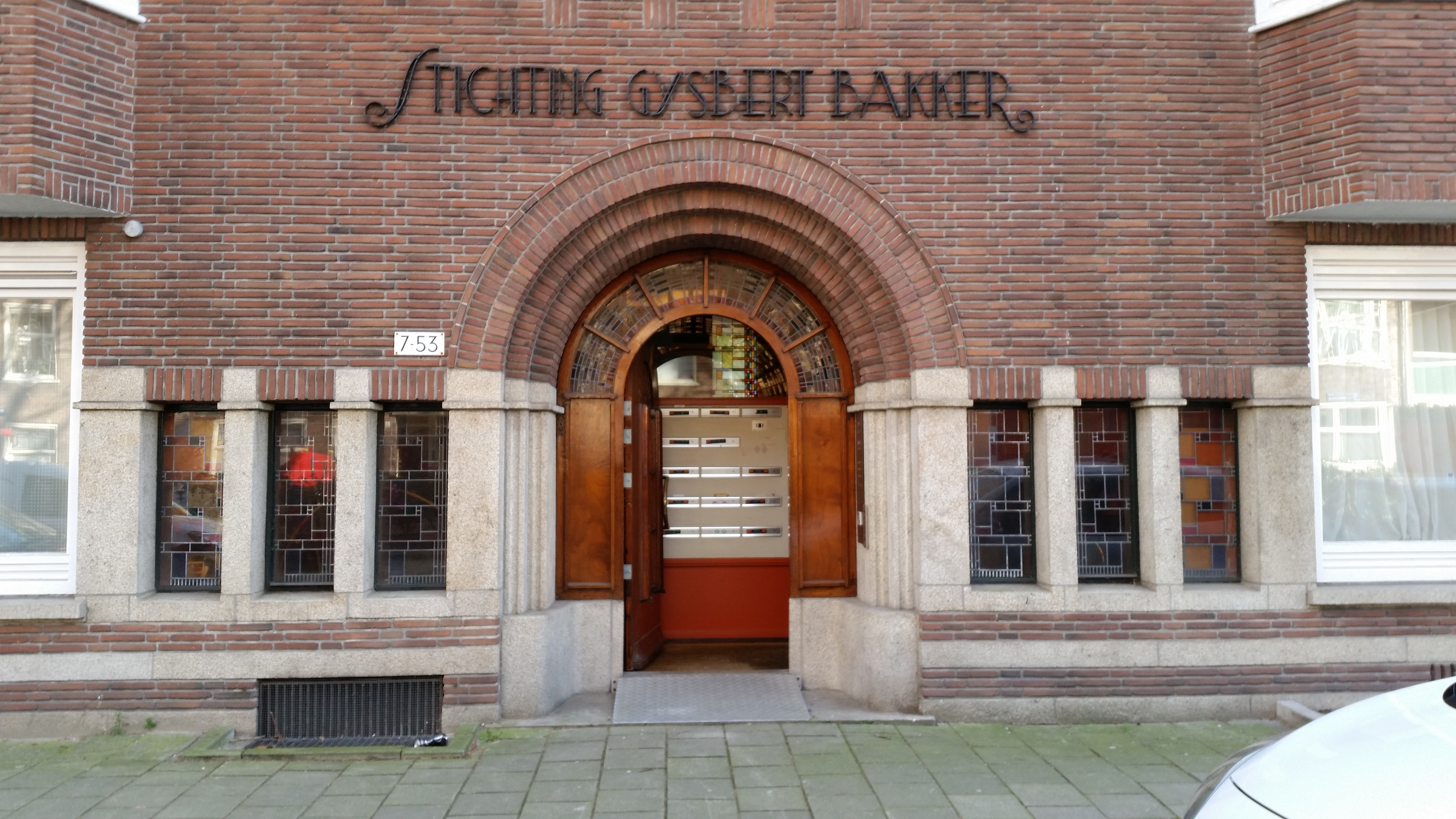 Pui van Reinier Claeszenplein 1-61, Amsterdam